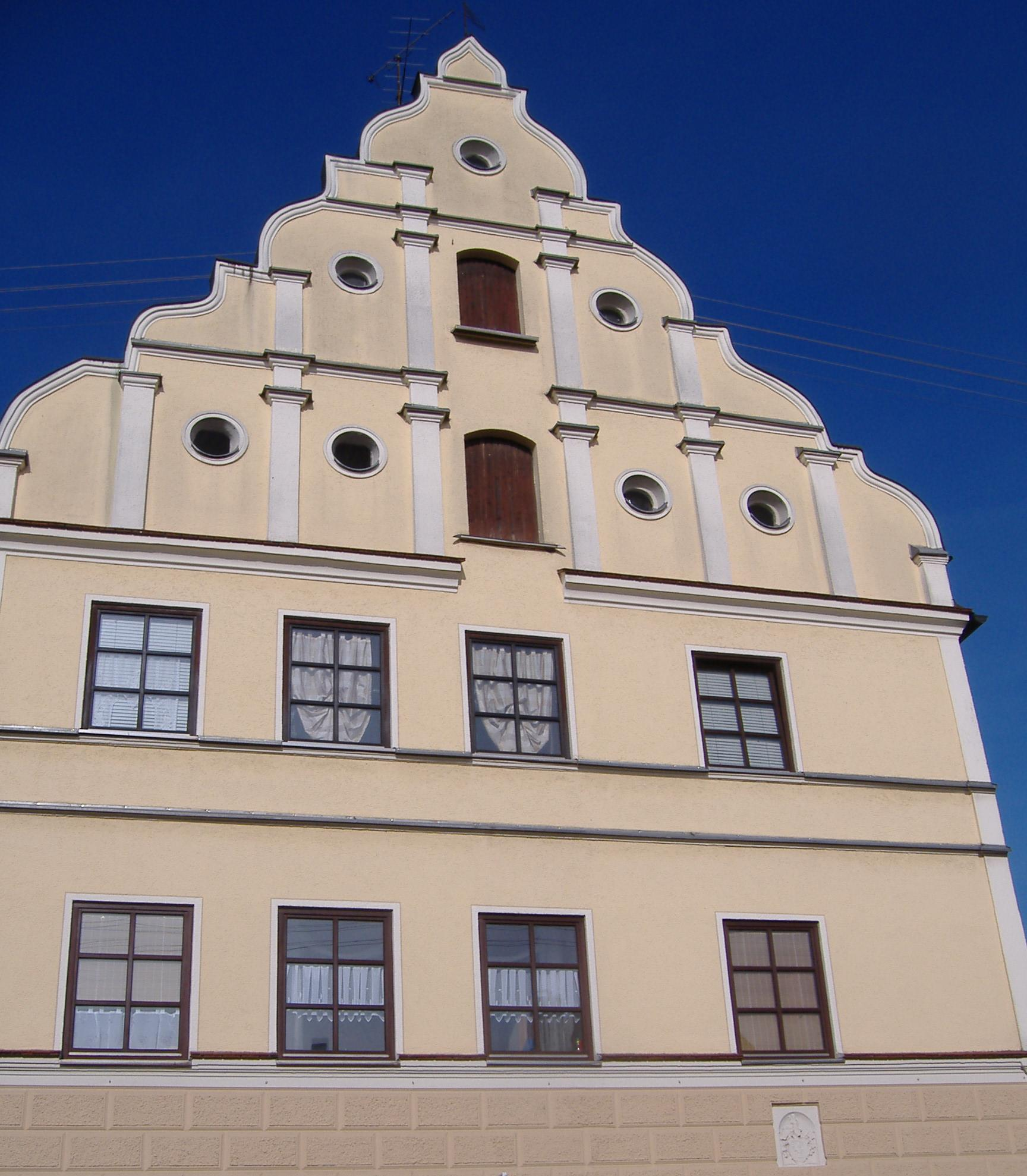 Höchstädt